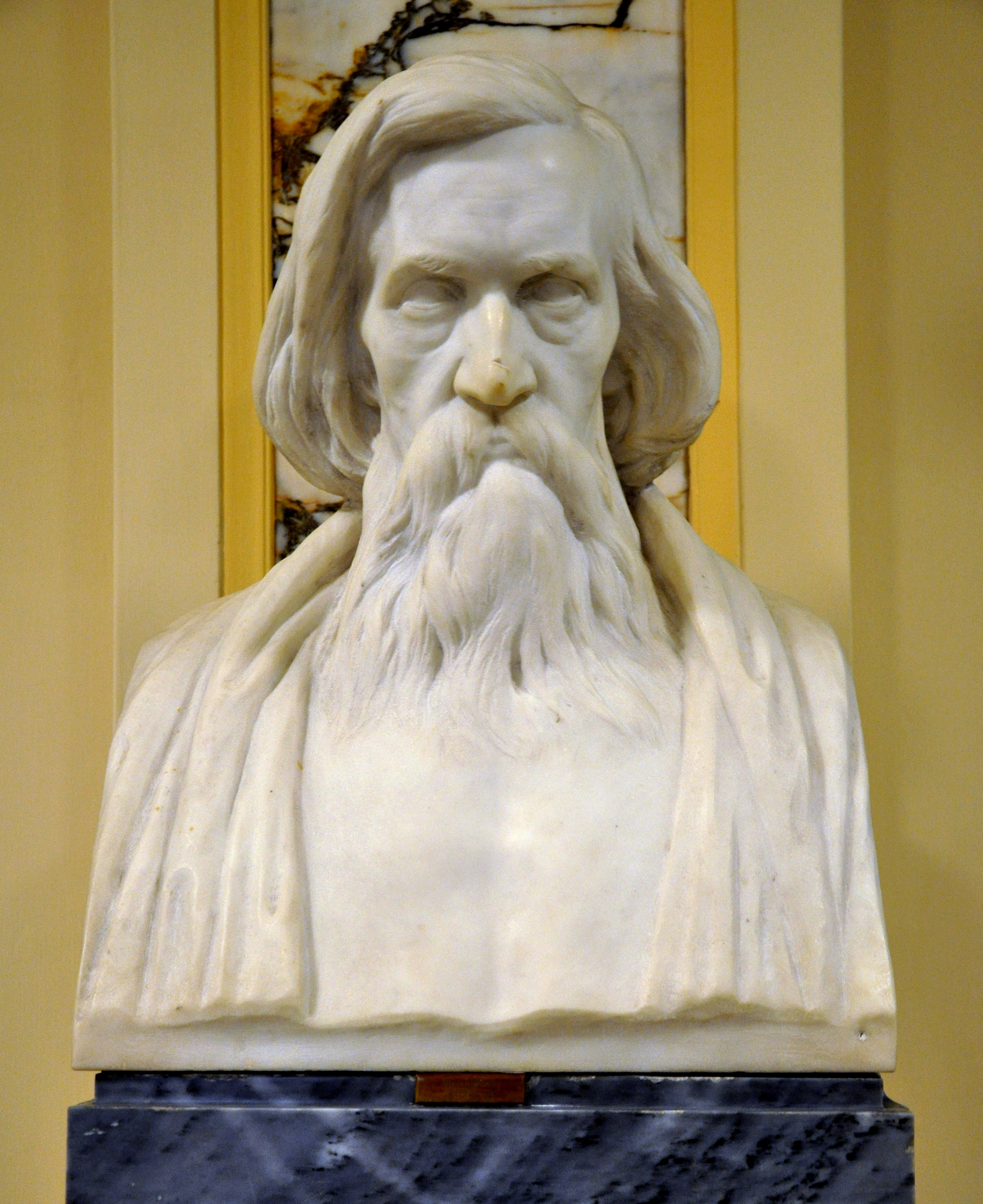 Meiningen, Theater, Büste Otto Ludwig, signiert "nach Hildebrand ausgef. O. Lessing 1909."